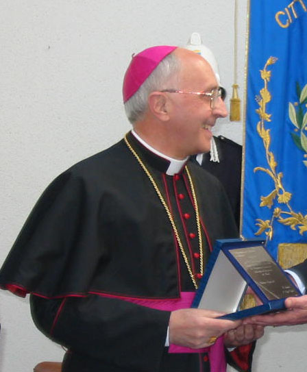 Consegna della Cittadinanza onoraria del comune di Galatone a Mons. Fernando Filoni